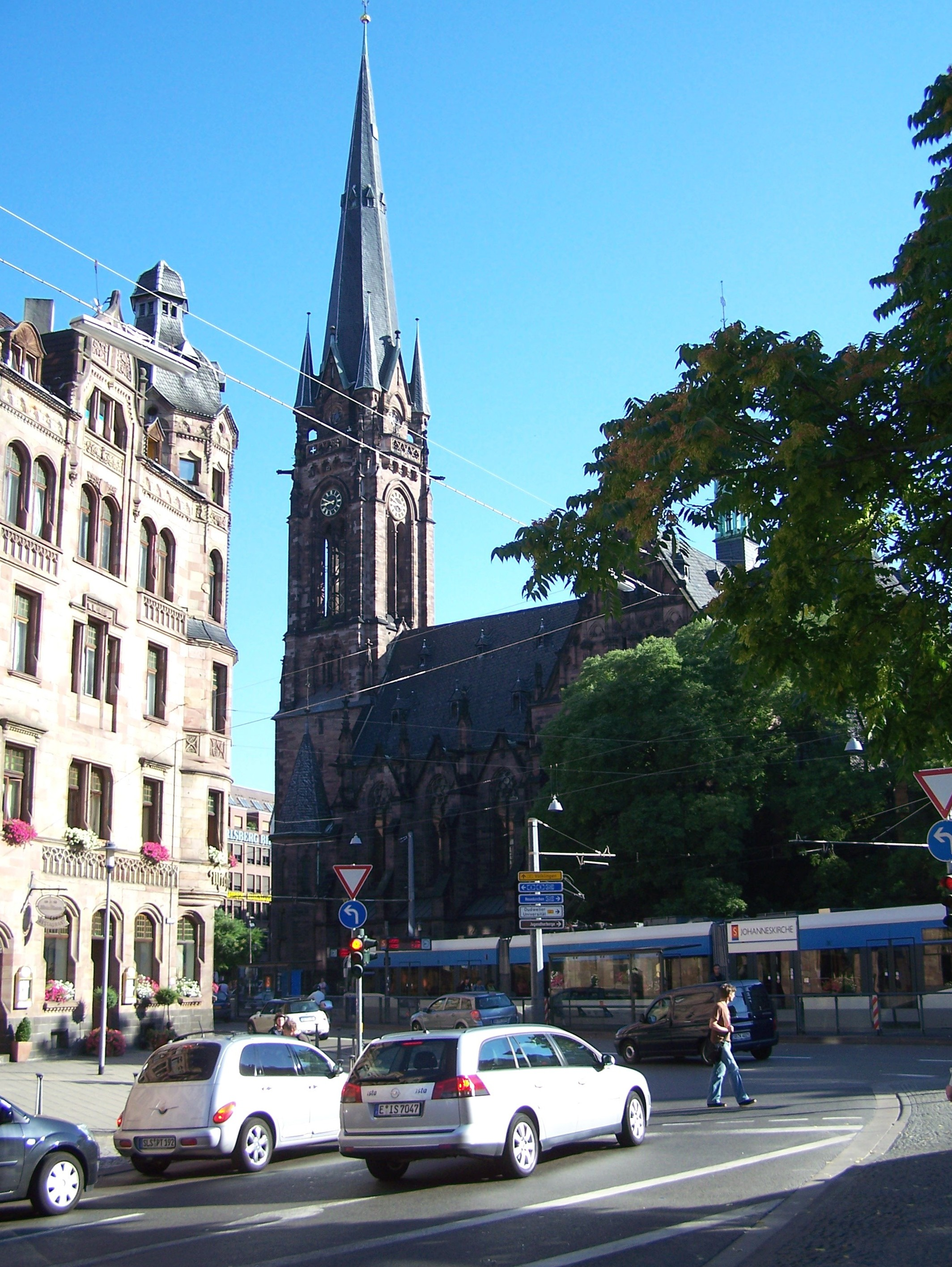 Johanneskirche in Saarbrücken, fotografiert vom Rathausvorplatz